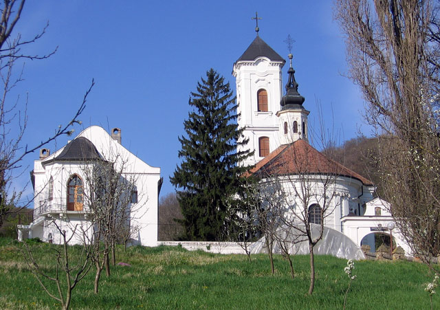 Vrdnik-Ravanica monastery, Serbia/Le monastère orthodoxe serbe de Vrdnik-Ravanica, Serbie